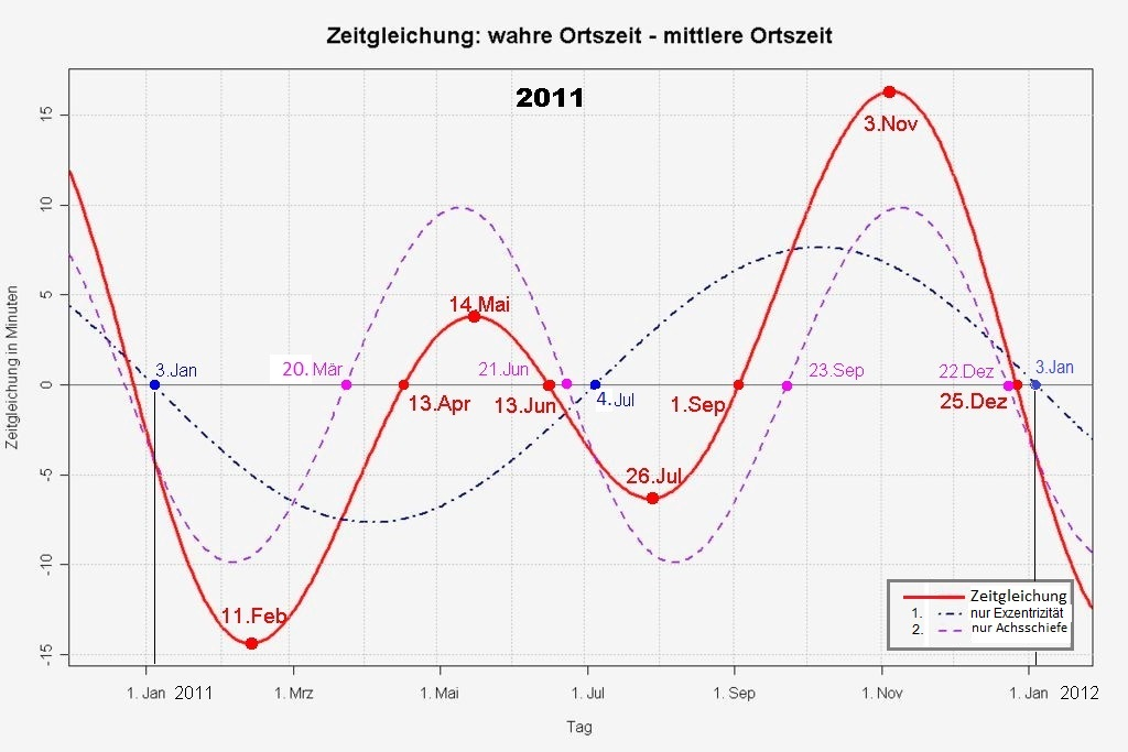 Zeitgleichung als Jahresdiagramm